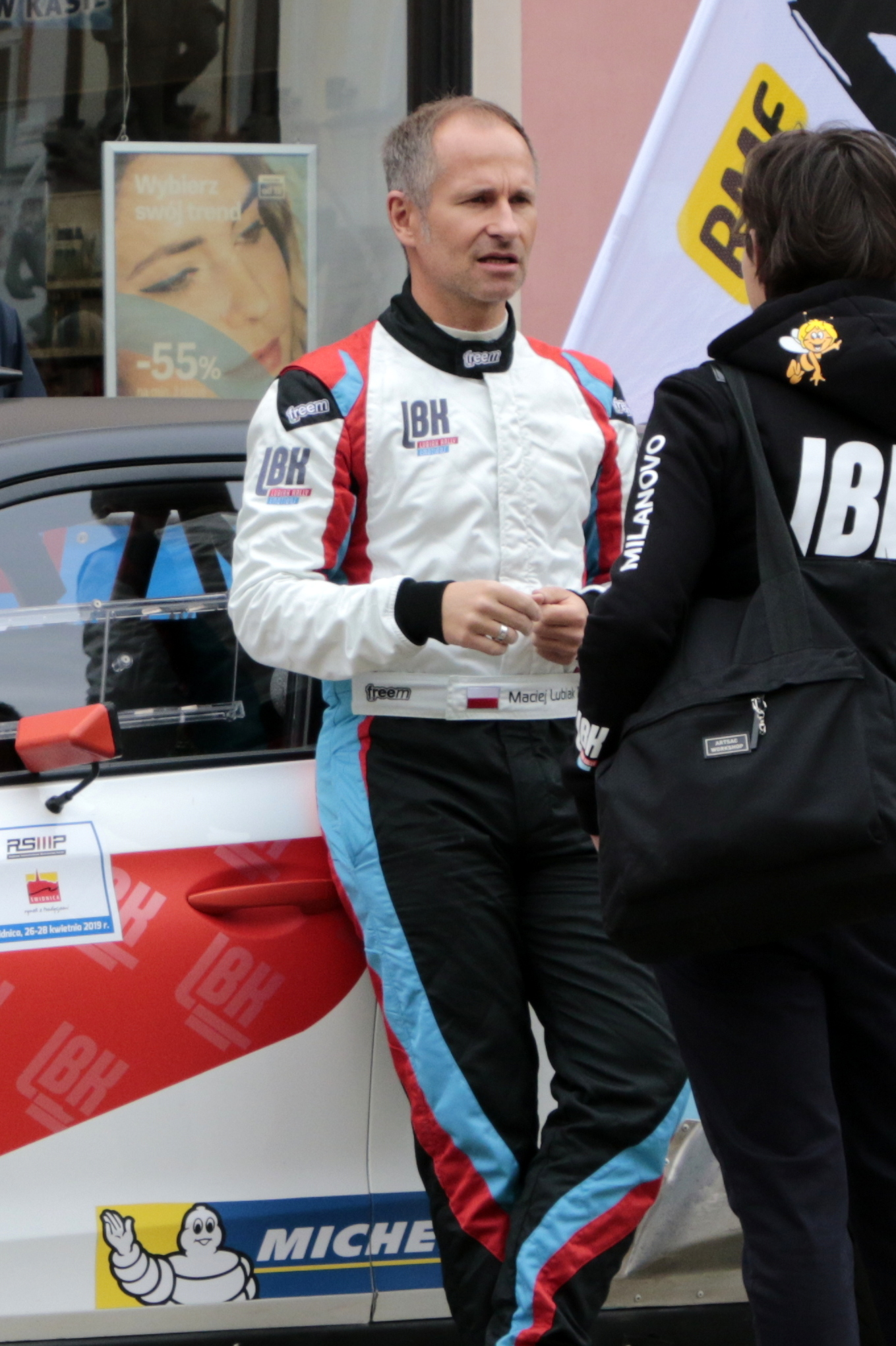 Rajd Świdnicki 2019 - Maciej Lubiak